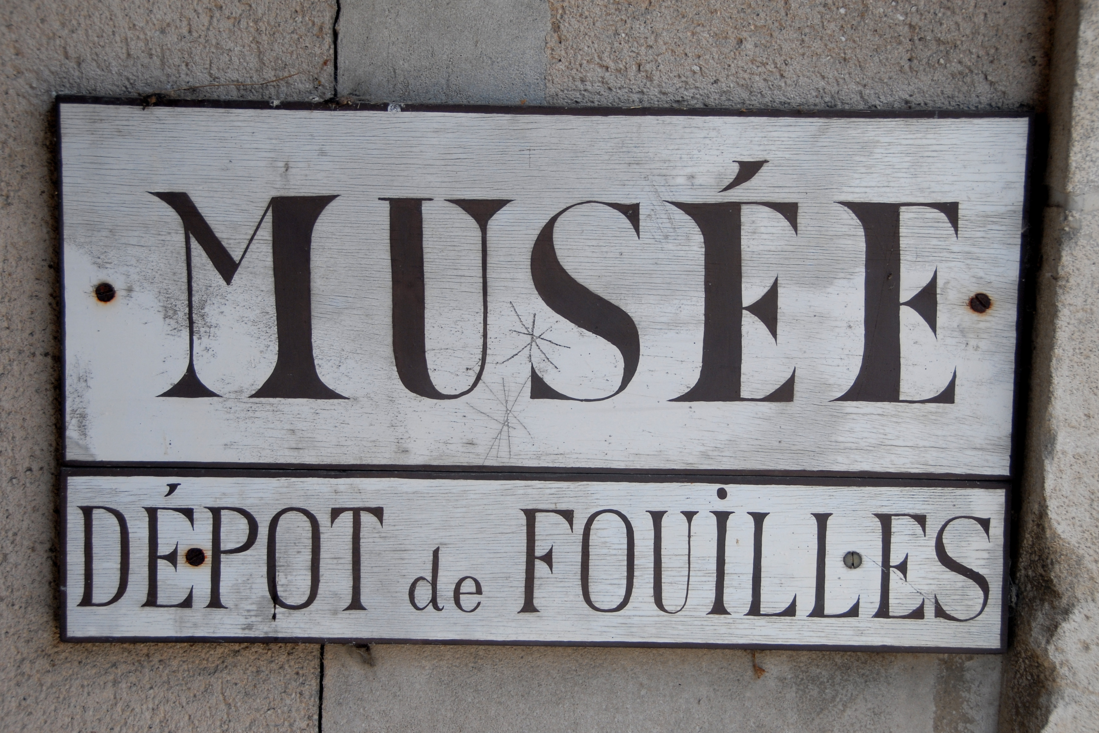 Antigny, Ausgrabunbgsmuseum